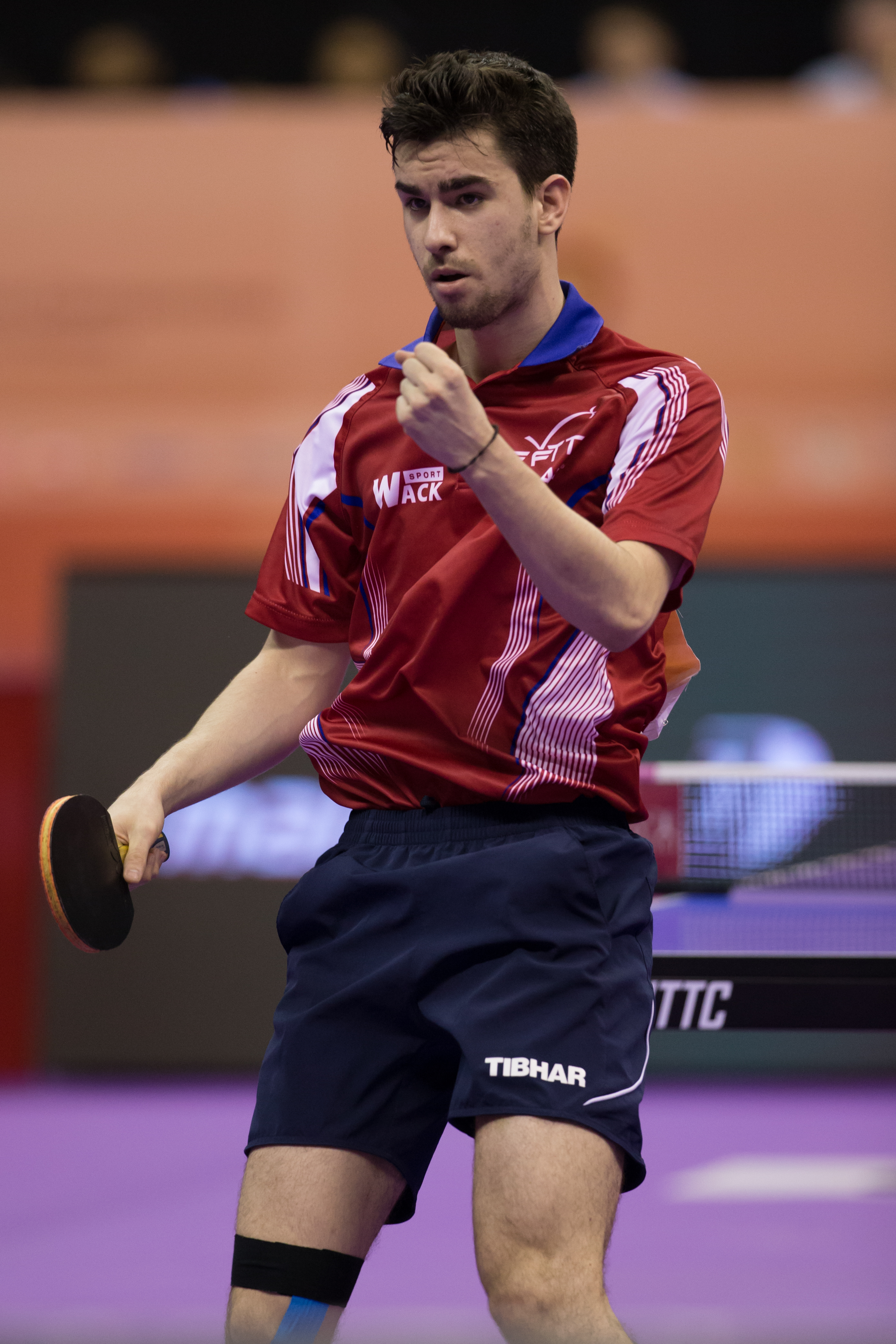 _K0K4218